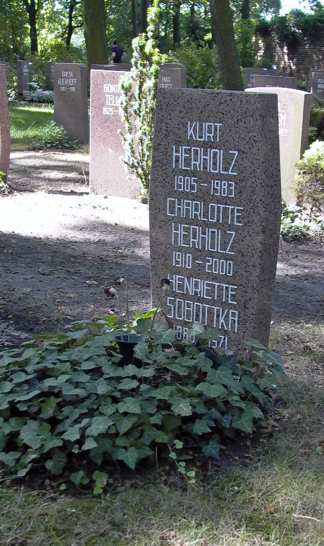 Grabstelle von Kurt Bruno Herholz und seiner Frau Charlotte Sobottka und deren Mutter Henriette